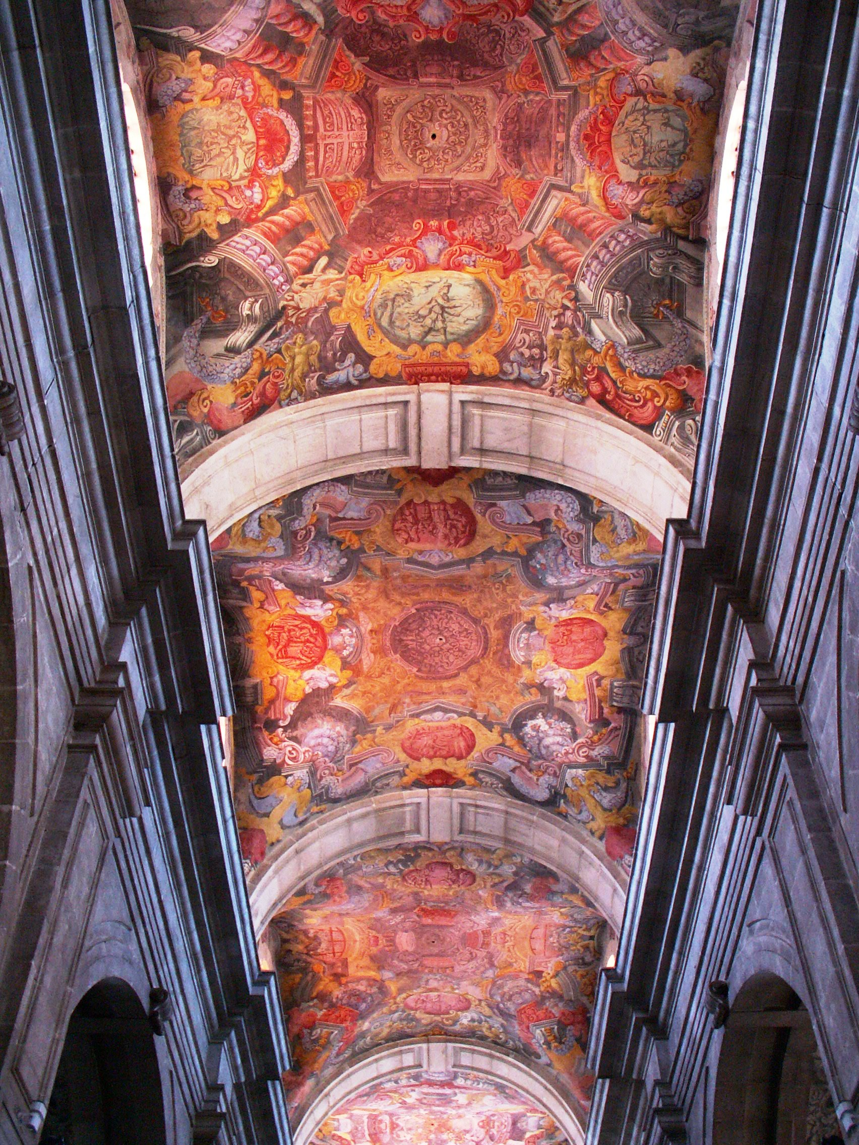 Heaven is red